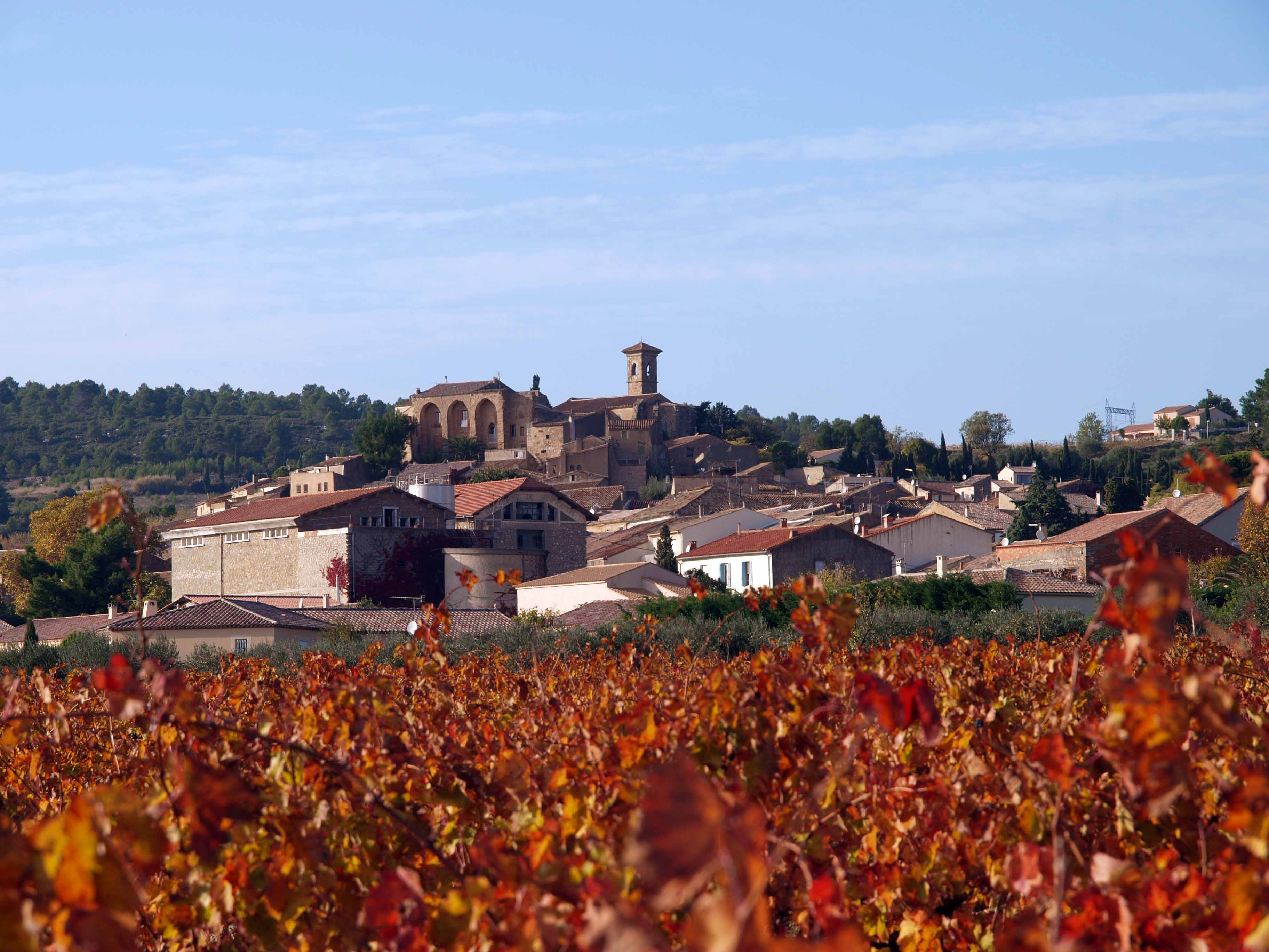 Montouliers (Hérault) : vue générale